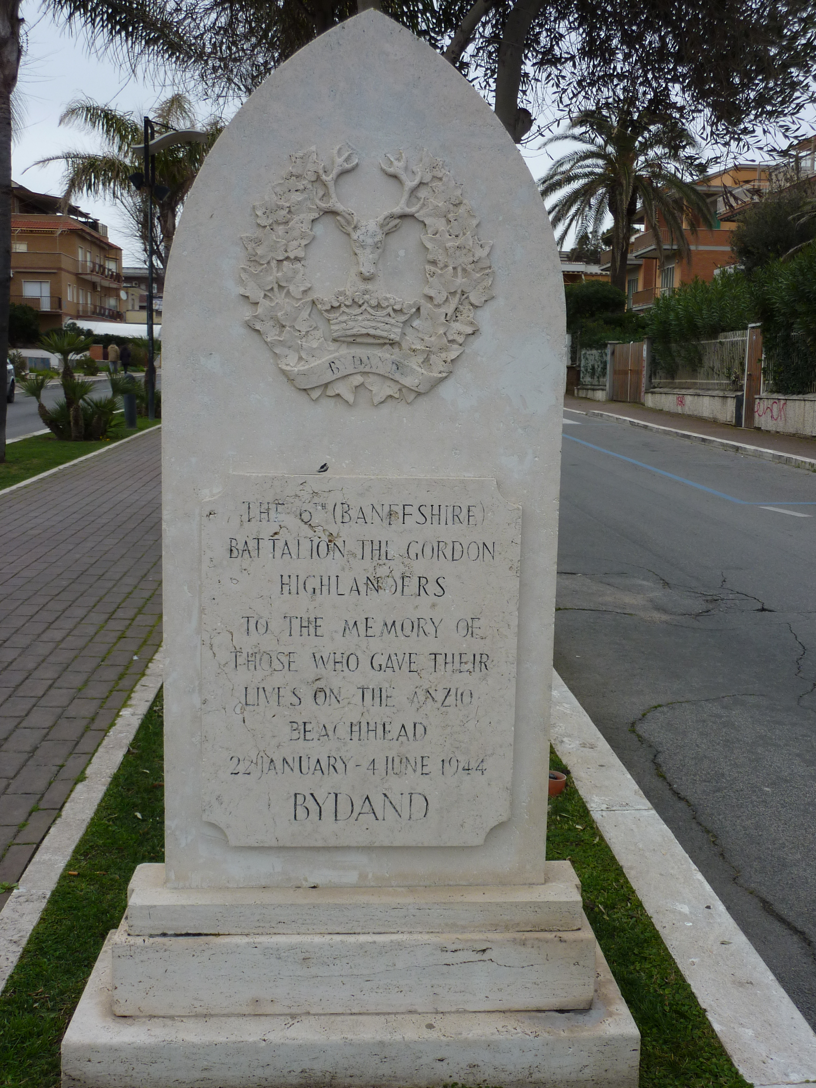 Cippo commemorativo dello sbarco britannico (testa di ponte di Lavinio, 1944).